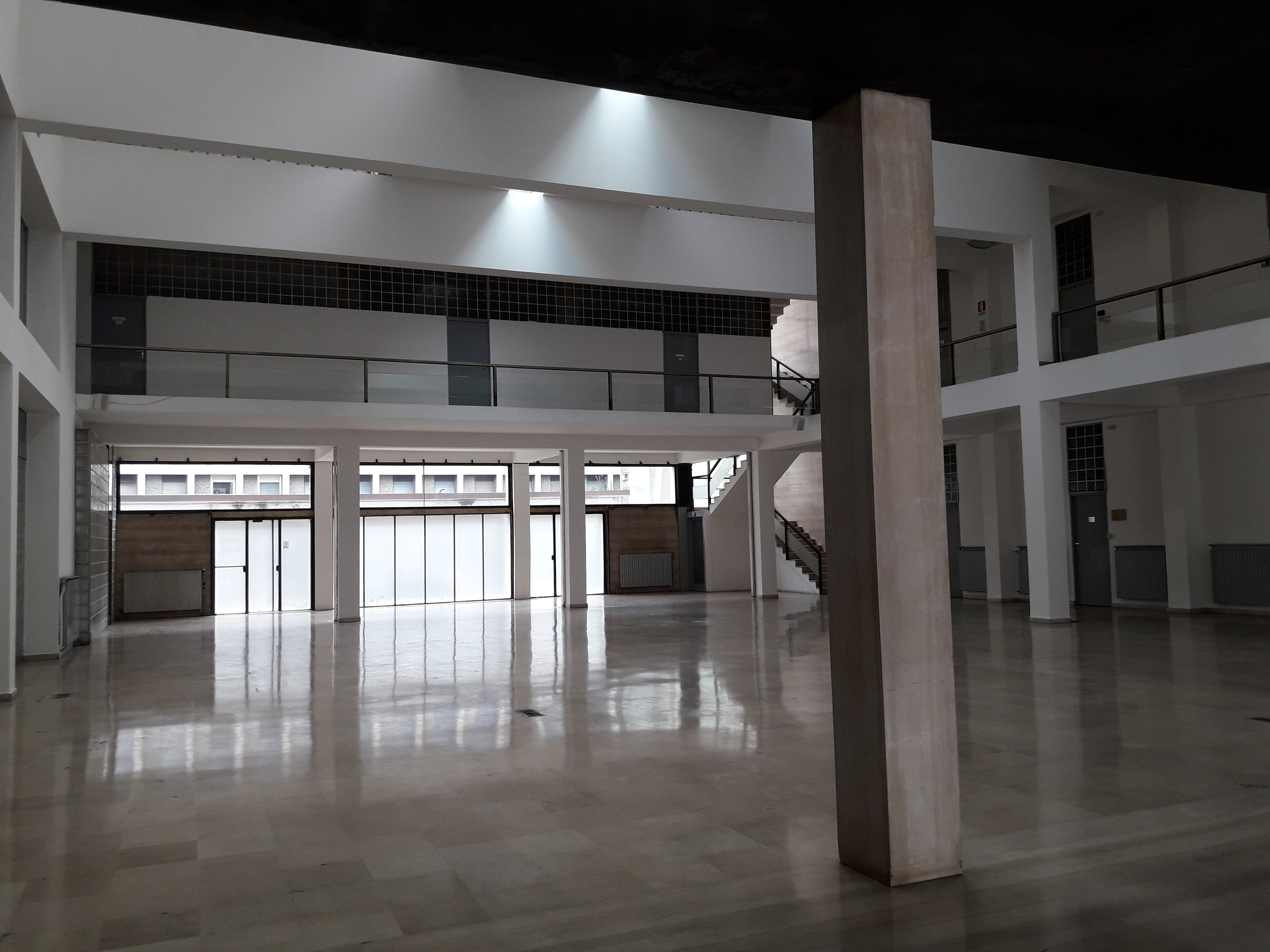 Architettura interna Palazzo Terragni, Como This is a photo of a monument which is part of cultural heritage of Italy.